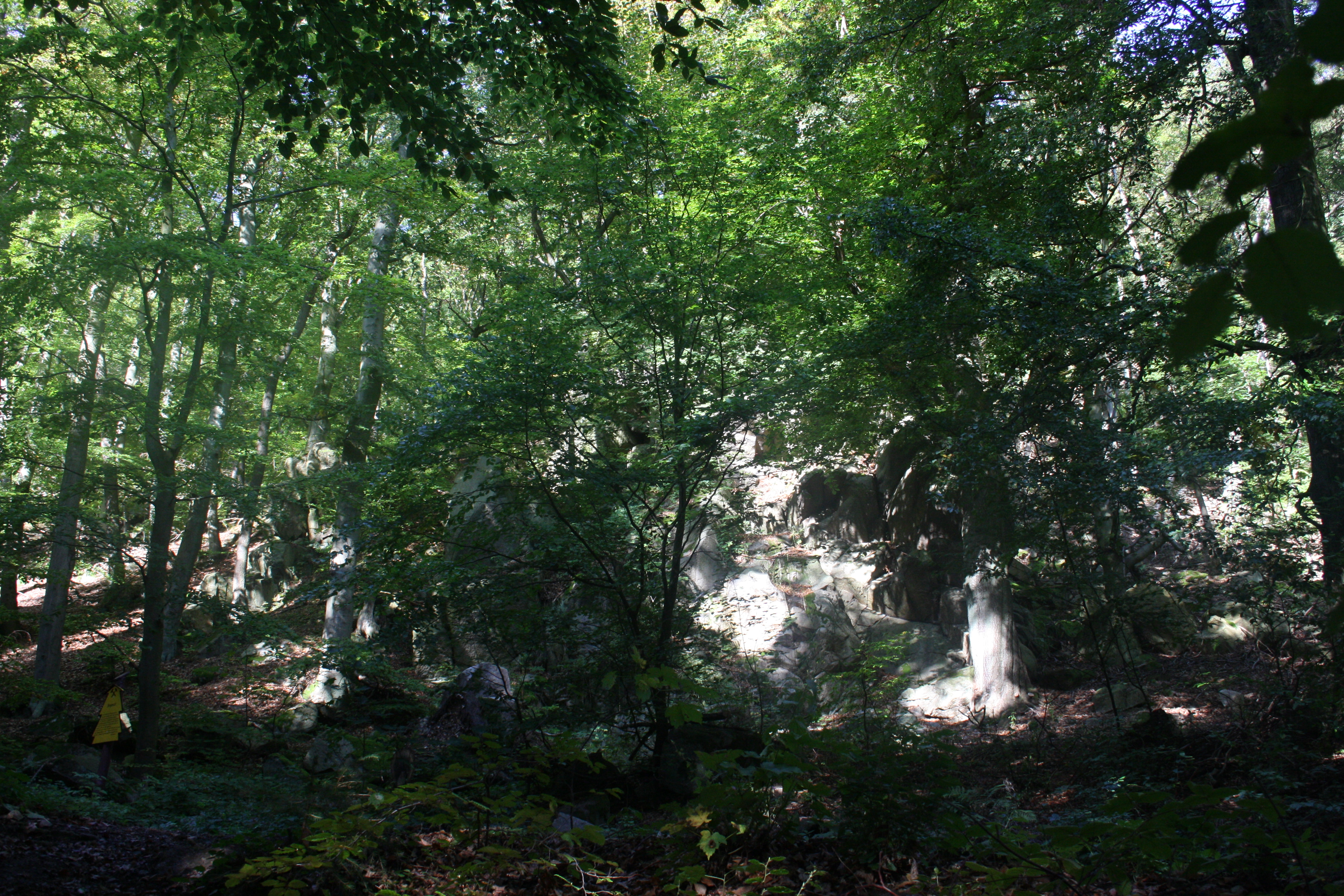 Harz Wanderung Stecklenberg - Hexentanzplatz / Thale - Wurmtal / Sommerklippe